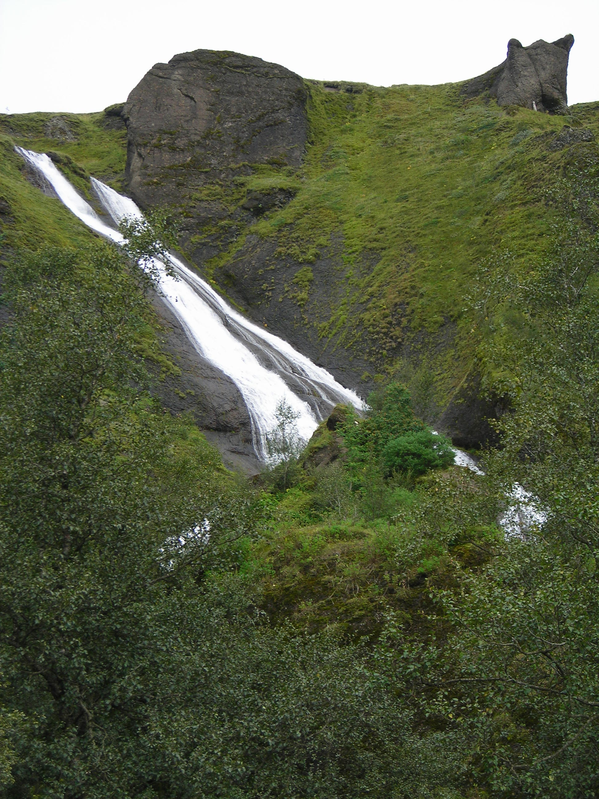 cascata di Systrafoss, Islanda